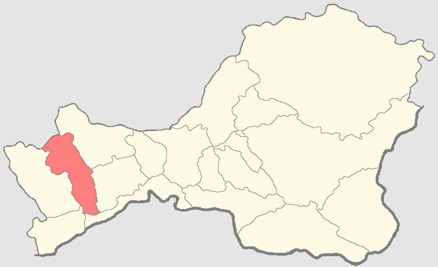 Барун-Хемчикский кожуун на карте Тывы